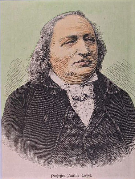 Professor Paulus Cassel, Prediger an der Christuskirche in Berlin, teilkolorierter Holzstich, ca. 12 x 11 cm